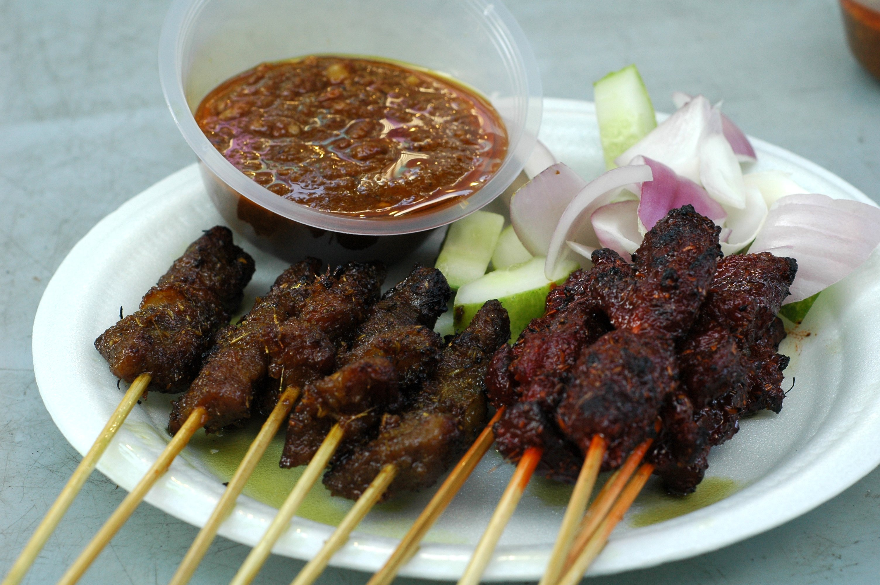 Singapore-style Satay at Lau Pa Sat's Satay Club